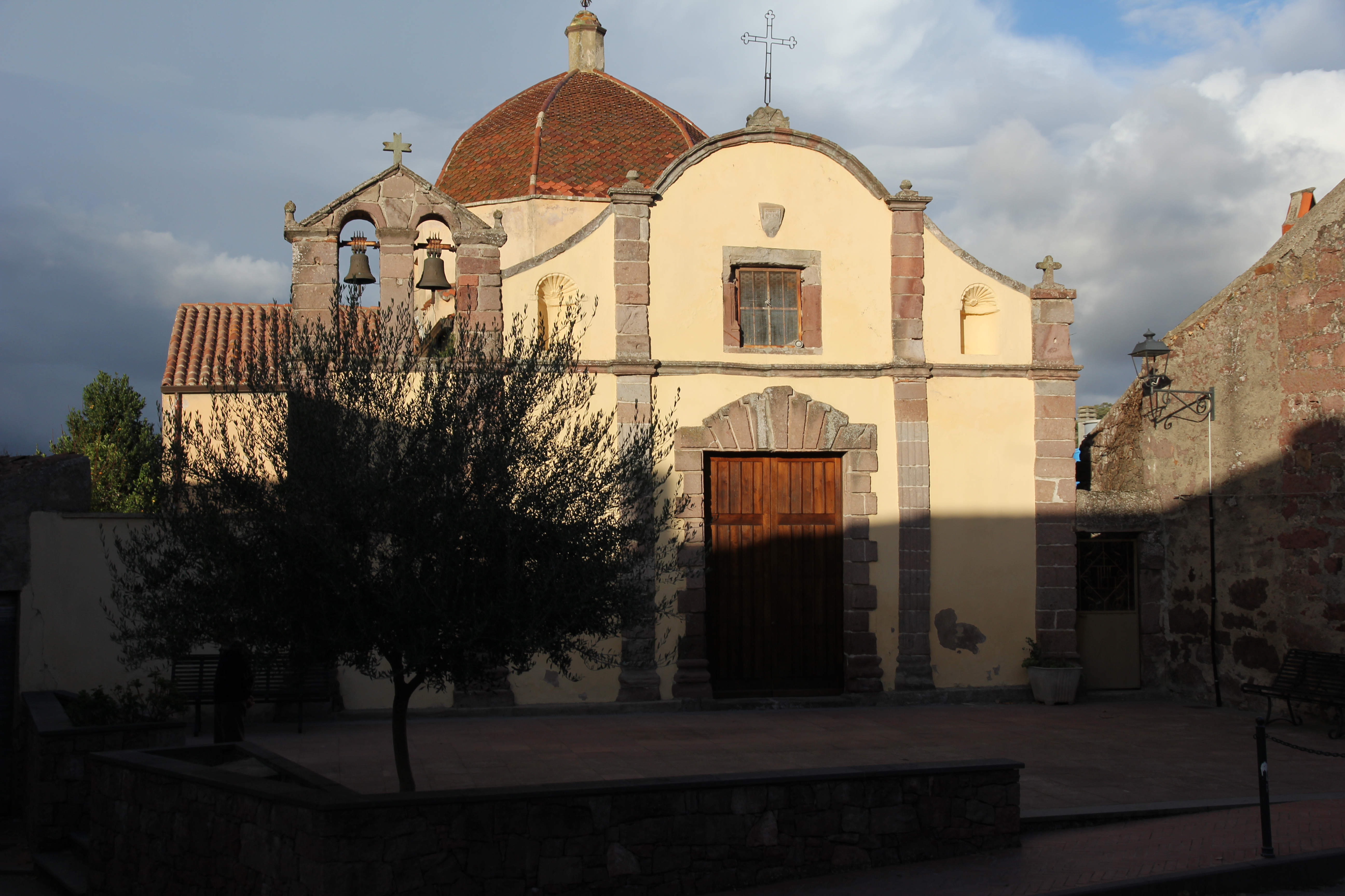 Busachi - Chiesa di San Bernardino